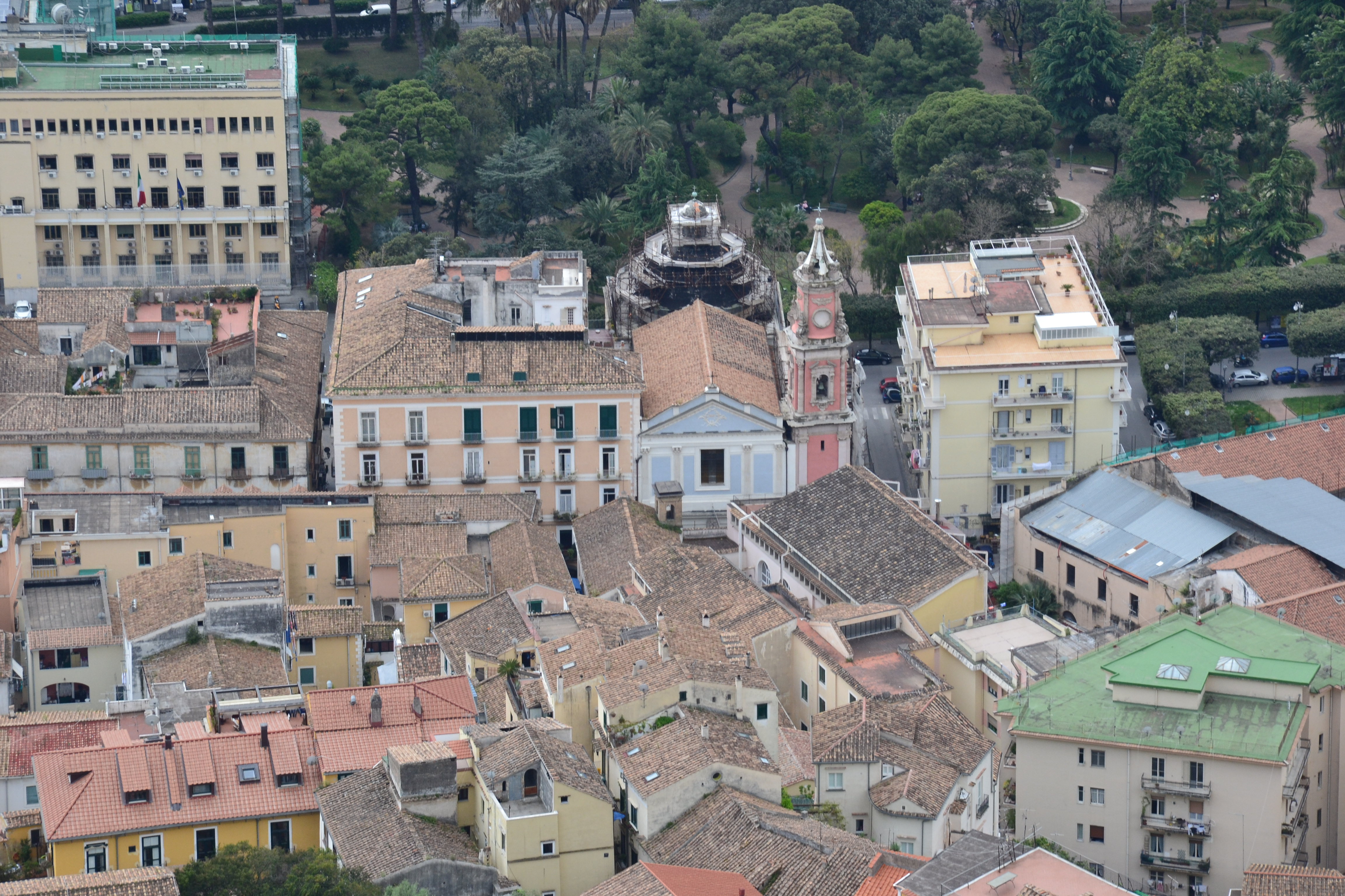 Vista del Rione Fornelle a Salerno